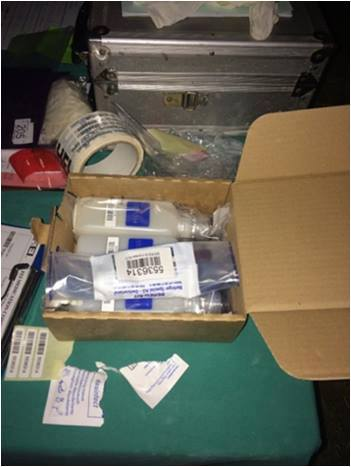 Odvzem ter označevanje vzorcev za kasnejšo preiskavo.